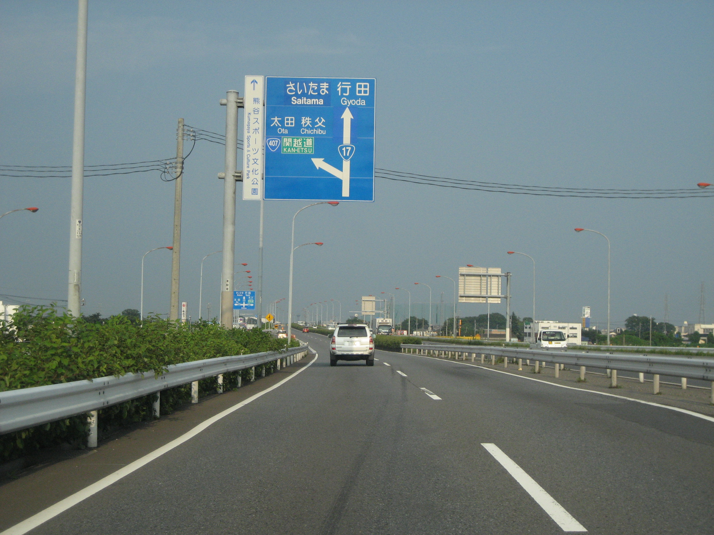 国道17号線熊谷バイパス（埼玉県熊谷市代付近）